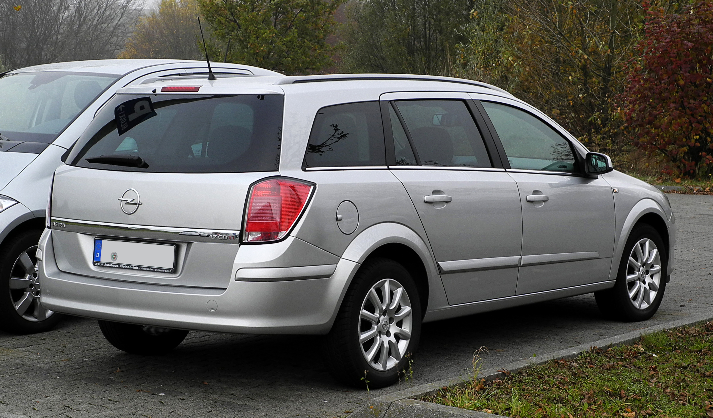 Opel Astra Caravan 1.7 CDTI Elegance (H)